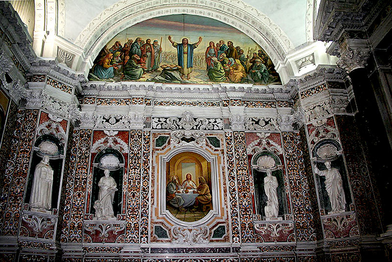 Duomo di Reggio Calabria, Cappella del Santissimo Sacramento, in stile barocco. Dichiarata nel XIX secolo monumento nazionale, è il più importante monumento d'arte barocco-seicentesca dell'arcidiocesi reggina. Fu fatta erigere nel 1539 dall'arcivescovo Agostino Gonzaga come "Cappella della Santissima Trinità", e successivamente fu trasformata dalla Congregazione del Santissimo Sacramento - con bolla apostolica del 1548 - in "Cappella del Santissimo Sacramento"; a quel tempo infatti la congrega era una delle istituzioni più fiorenti della città. Nel 1599 fu fatta restaurare dall'arcivescovo D'Afflitto (1594-1638), e successivamente da mons. Polou, che ne commissionò un'opera di abbellimento iniziata nel 1640, ma nel 1642 i lavori furono interrotti. Il 14 febbraio 1655 i Rettori della Cappella del Santissimo Sacramento affidarono al maestro scalpellino messinese Placido Brandamonte l'opera di abbellimento della Cappella. L'opera fu terminata nell'agosto del 1655.